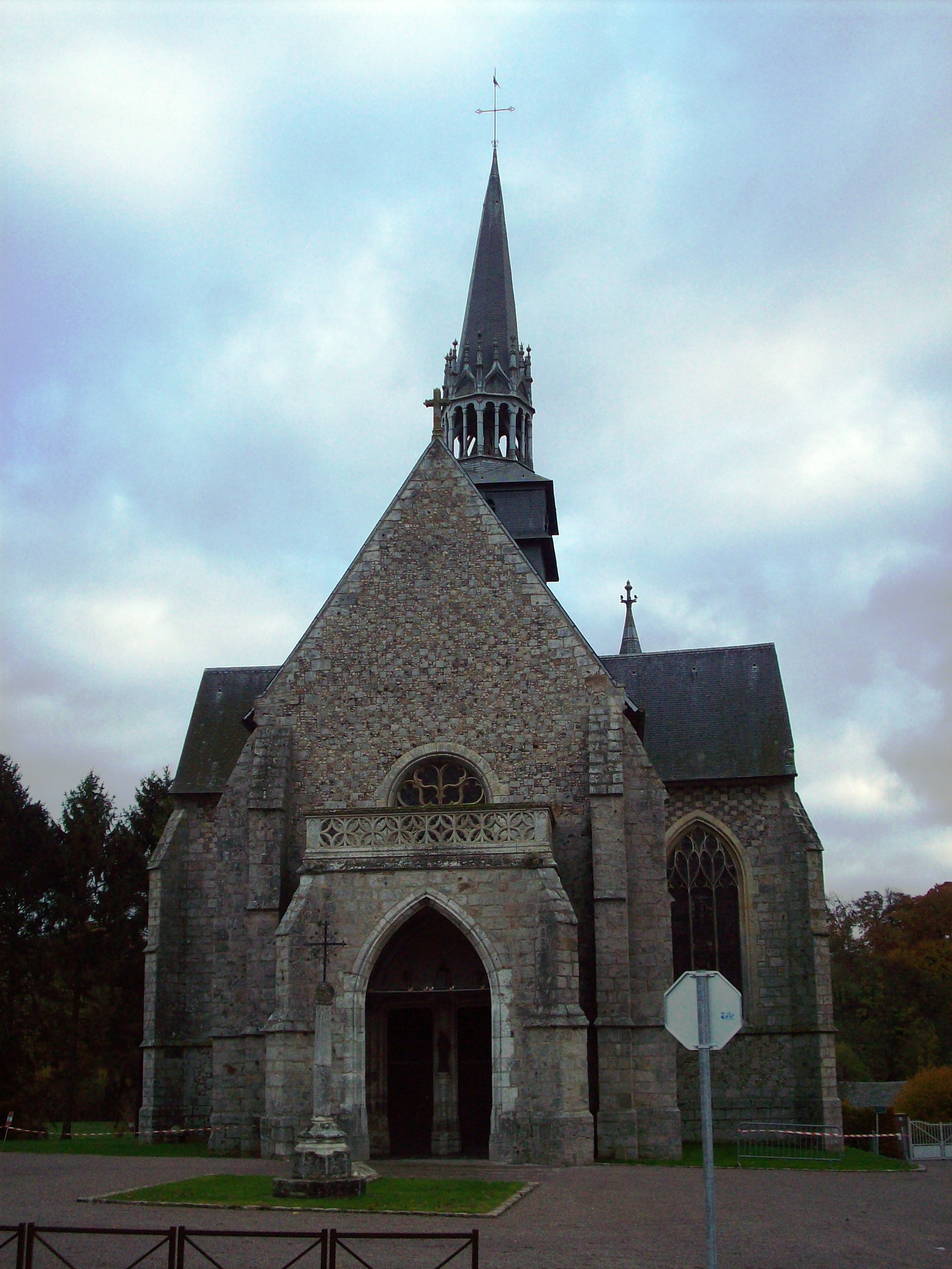 Collégiale Saint-Michel, aujourd'hui église paroissiale.